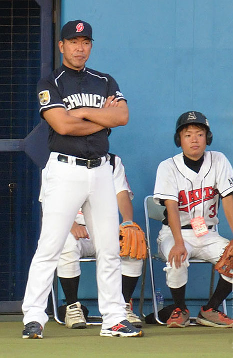 中日ドラゴンズ、井上一樹コーチ。こまちスタジアムで。